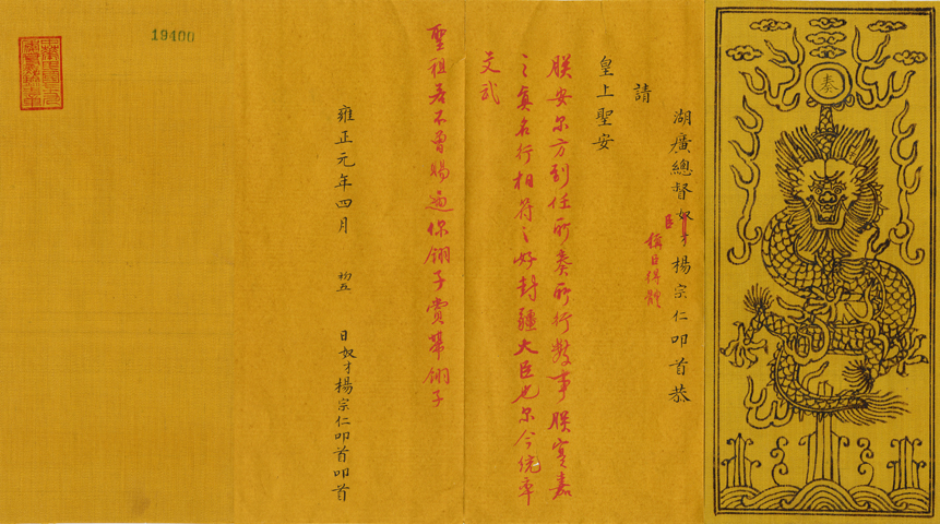 湖廣總督楊宗仁奏